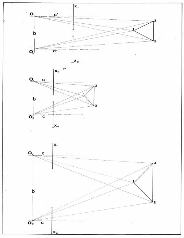 Schema del modello ottico tridimensionale